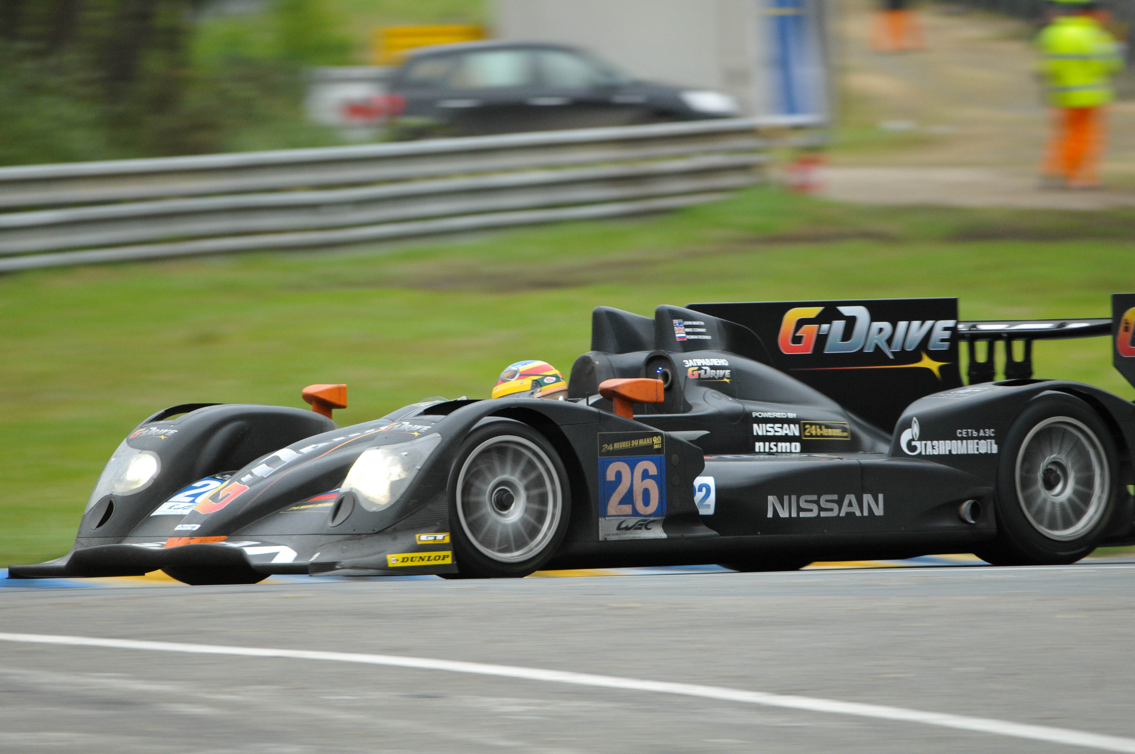 Le Mans 2013